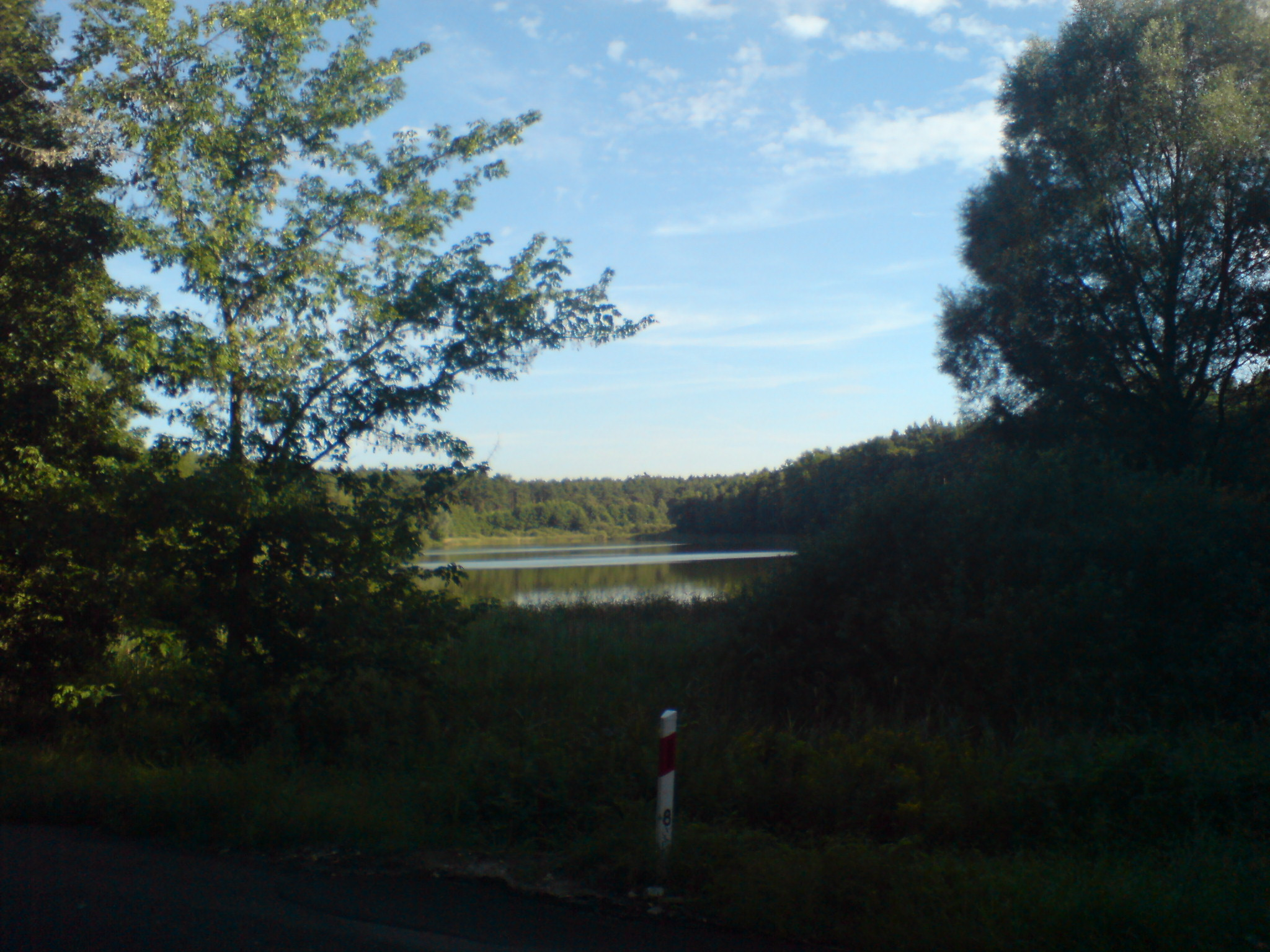 Jezioro Godziszewskie w pobliżu Lesionek